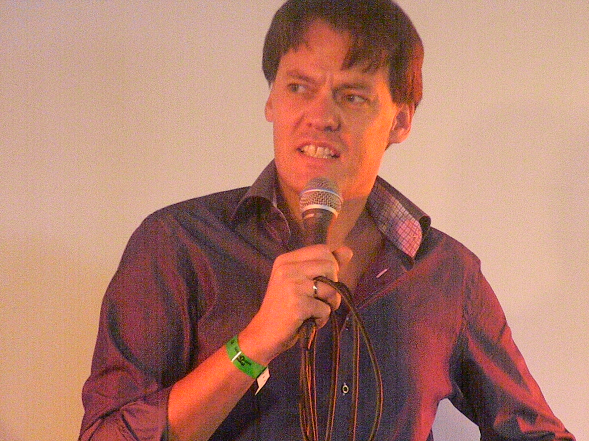 Tijs van den Brink, EO-journalist tijdens een paneldiscussie op het Flevo Festival op 21 augustus 2010.